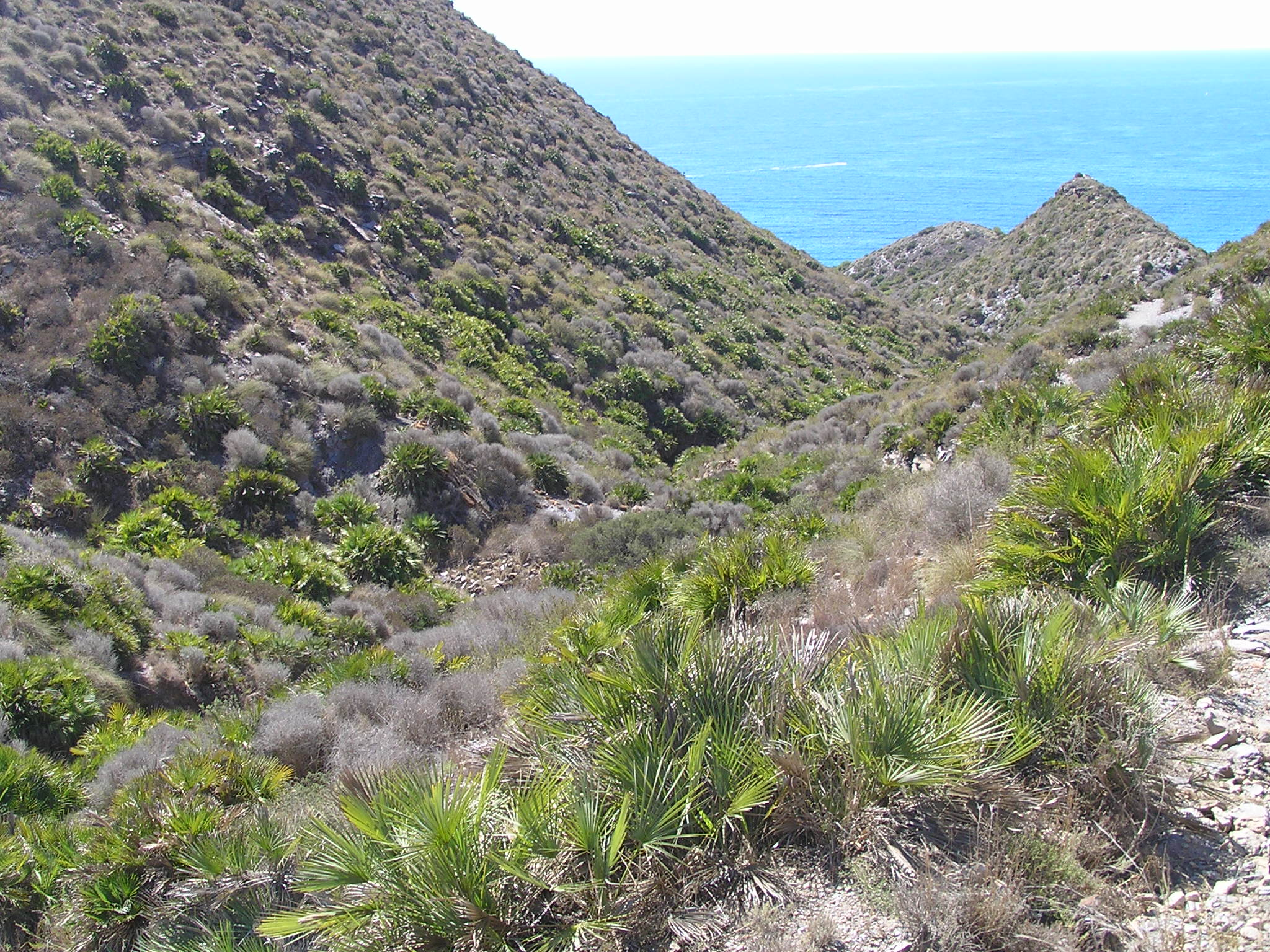 Palmitos y más. Un ejemplo de vegetación árida bien conservada.